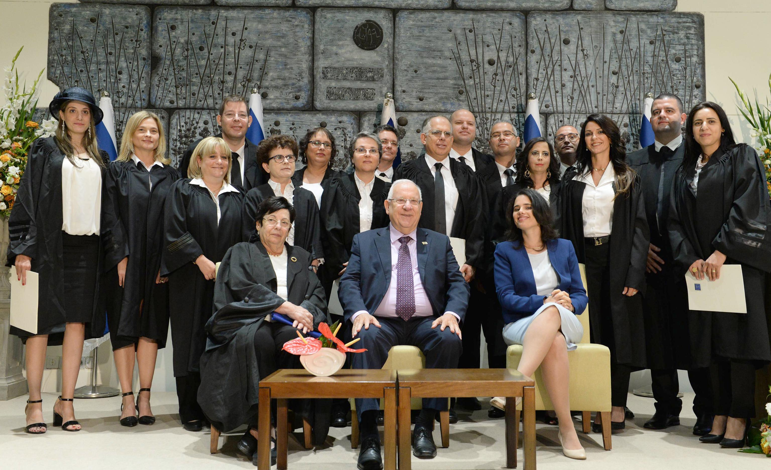 טקס השבעת שופטים בית משפט שלום ומחוזי שהתקיים בבית נשיא מדינת ישראל ראובן ריבלין בהשתתפות איילת שקד שרת המשפטים ומרים נאור נשיאת בית המשפט העליון בטקס הושבעו 16 שופטים ורשמים בכירים. ארבעה שופטים הושבעו לבתי המשפט המחוזיים, עשרה שופטים הושבעו לבתי משפט השלום, ושני רשמים הושבעו לבתי משפט השלום.